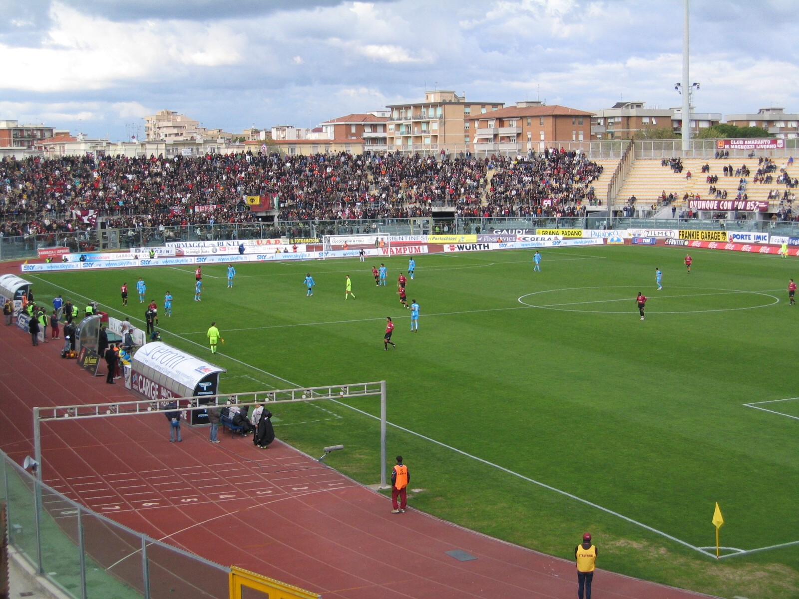 Stadio Armando Picchi, Livorno, Italy - (Livorno - Udinese)